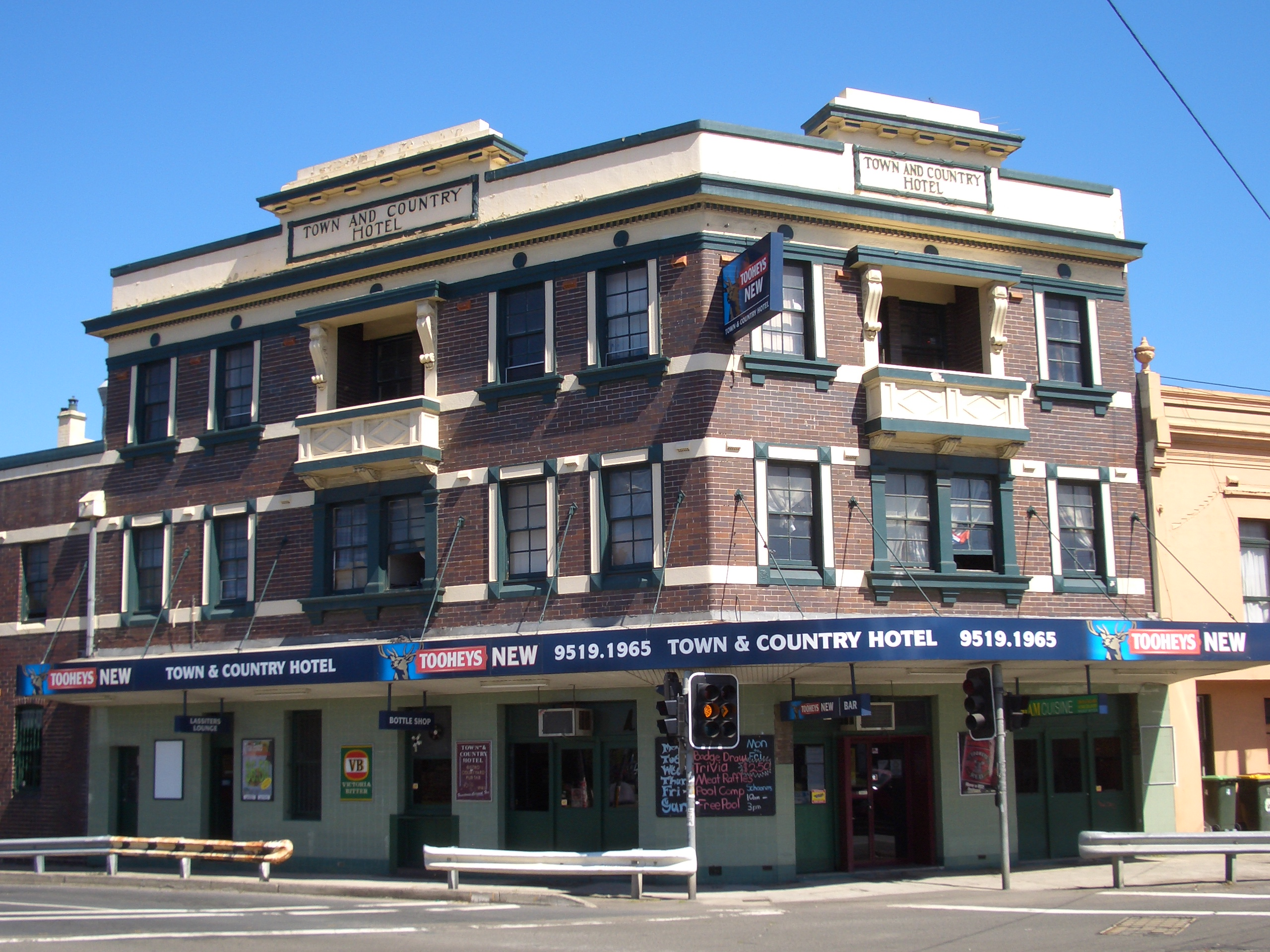 St Peters, Sydney